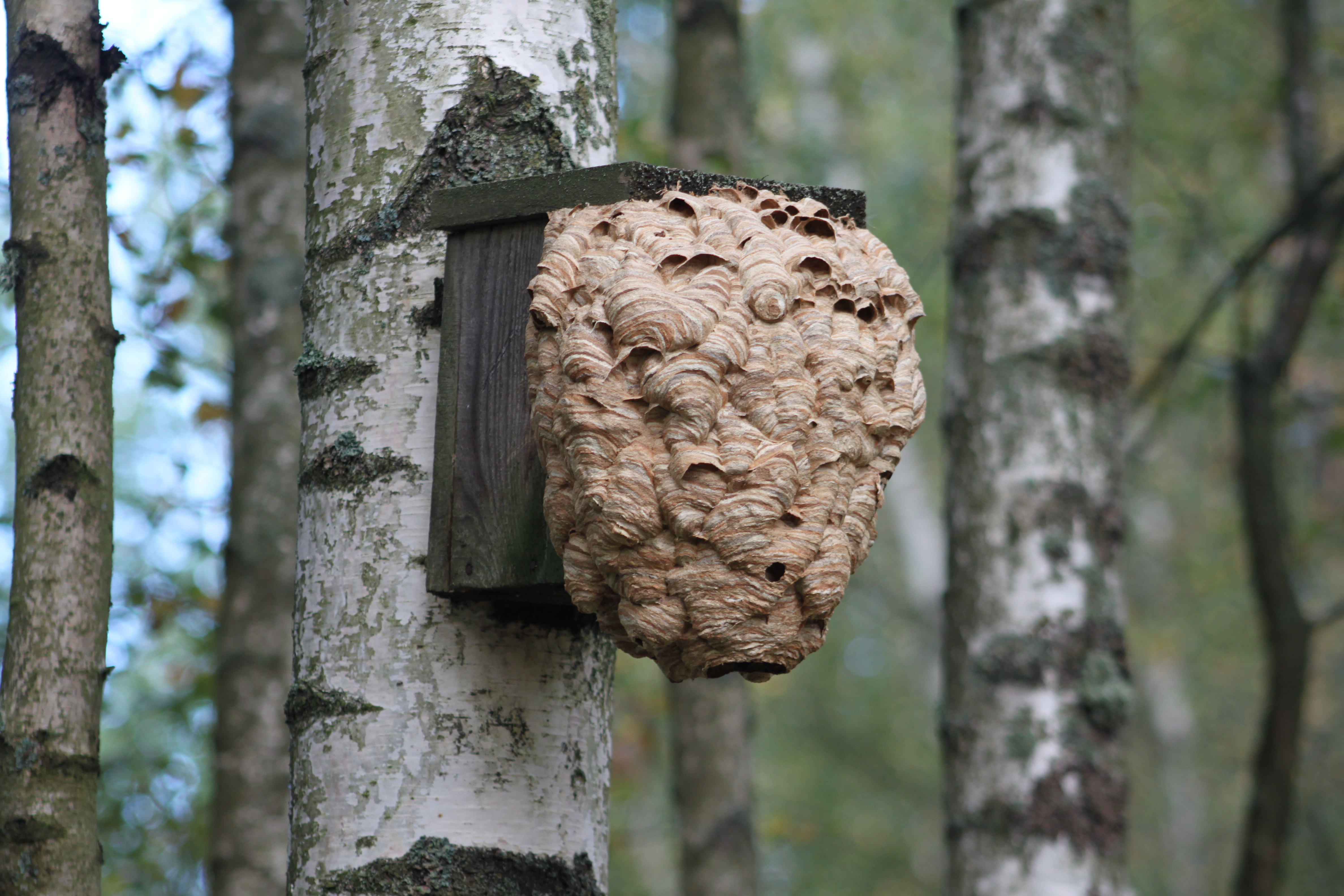 sirseņu ligzda putnu būrītī. Daugavgrīva, Rīga